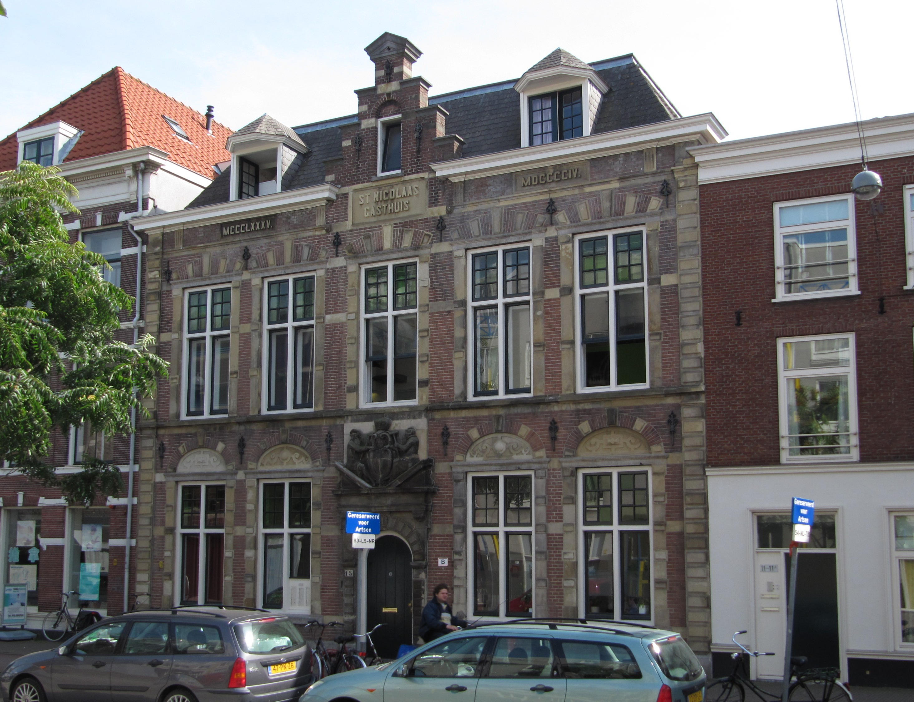 RM17452 Den Haag - Amsterdamse Veerkade 15.jpg